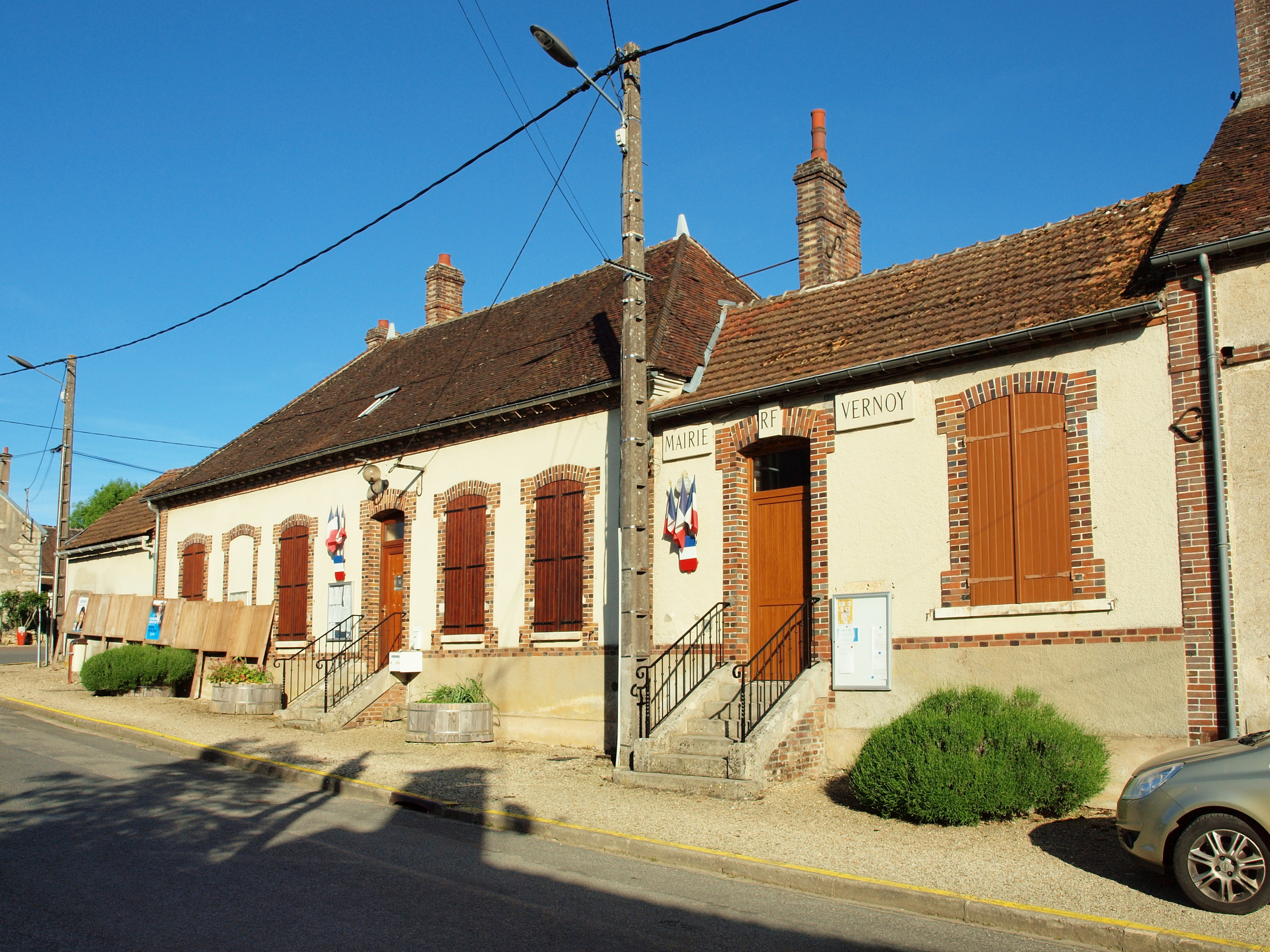 Mairie de Vernoy (Yonne, France)